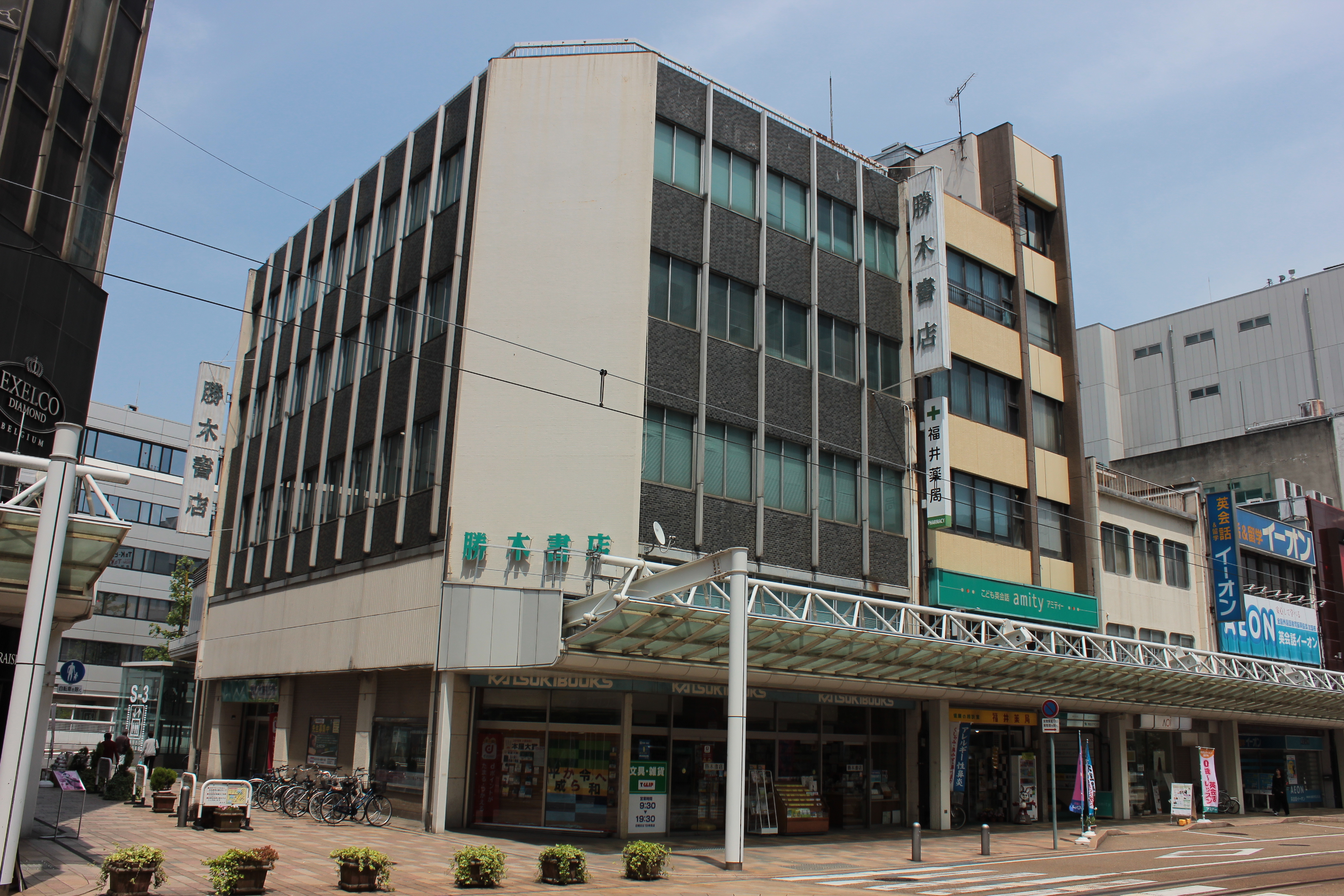 勝木書店本店（福井県福井市） Canon EOS Kiss X5